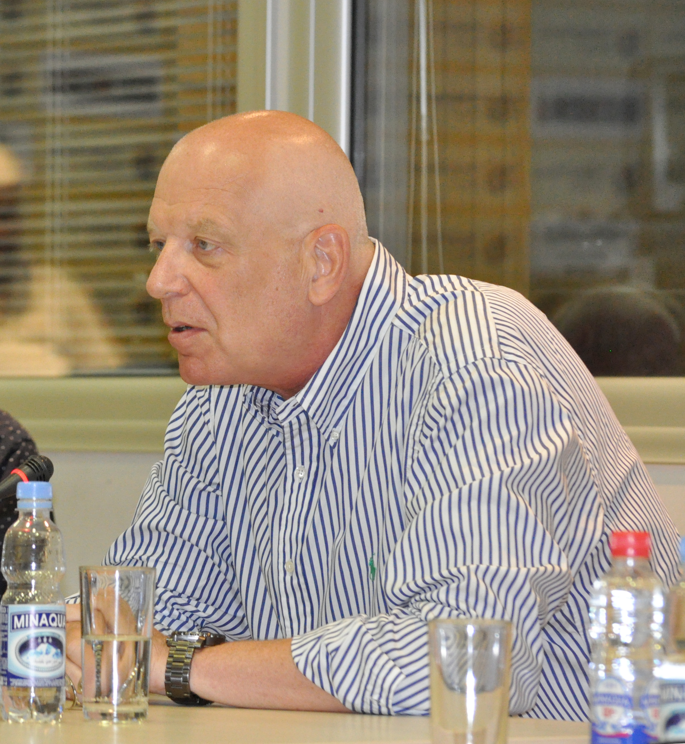 Милан Ст. Протић српски политичар.